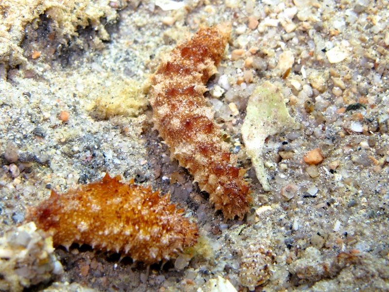 Holothuria impatiens (dalla Sardegna)